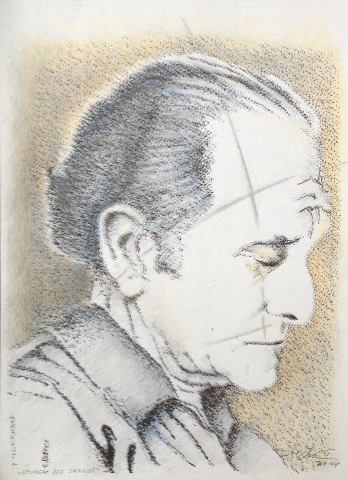 Porträt Fritz Ruoff, „Spuren des Ikarus“, von Ursula Stock, Mischtechnik auf Papier, Höhe x Breite: 30 x 21 cm, 2014.